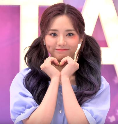 11일 오전 서울 상암동 tbs 오픈스튜디오에서 공개녹화로 ‘tbs 팩트인스타 - ‘프로미스나인’편이 진행됐다.